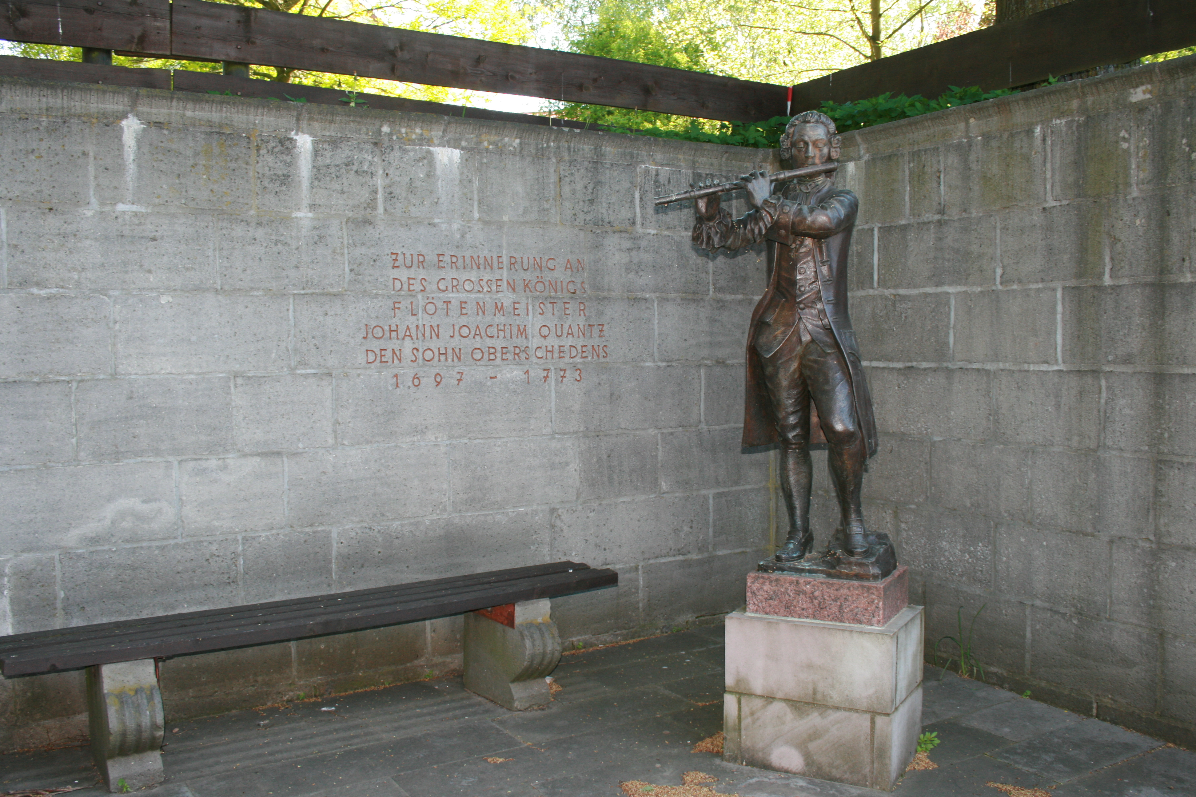 Quantz-Denkmal in Scheden, Quantzstrasse, Germany, 2008-05-12